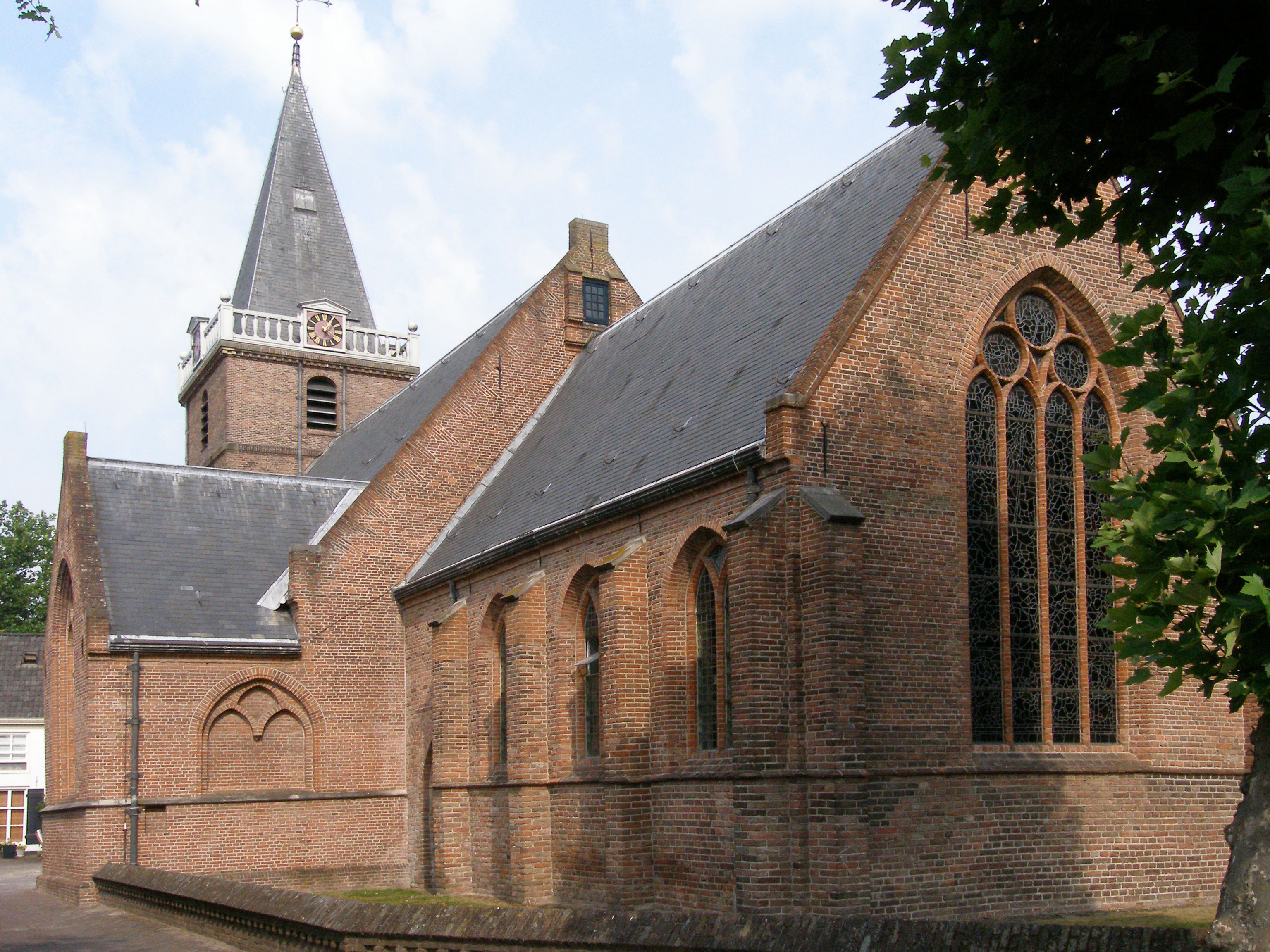 Hervormde Kerk, Vreeland